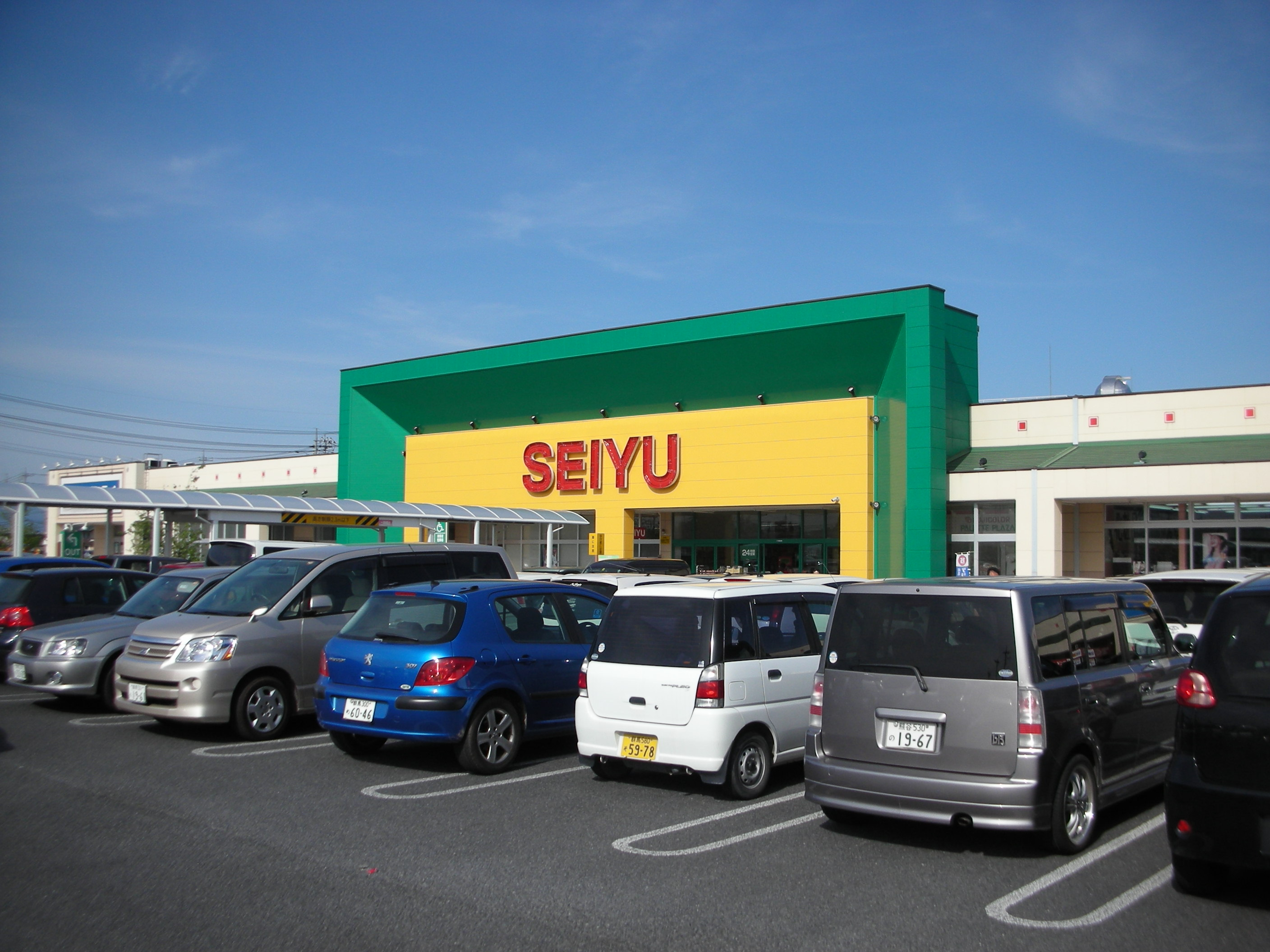 西友楽市伊勢崎茂呂店の外観